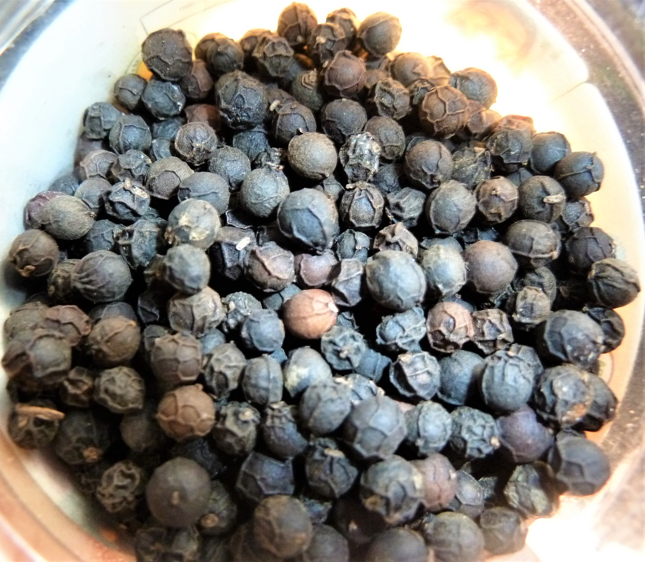 నల్ల మిరియాలు